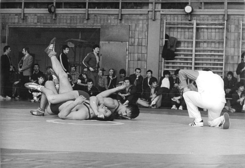 Uwe Neupert, Wolfram Thide ADN-ZB Liebers-16.2.80 Jena: DDR-Meisterschaften im Freistil der Ringer Europameister Uwe Neupert vom SC Jena gewann seinen ersten Kampf der Meisterschaft gegen Wolfram Thide von der SG Dynamo Luckenwalde durch einen Schultersieg in der Klasse bis 90 kg.